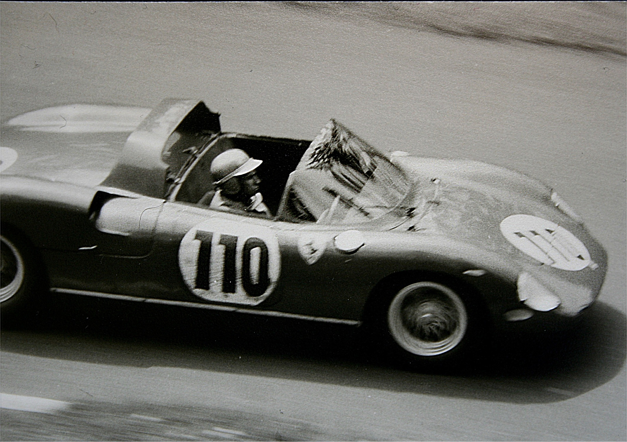 Bildbeschreibung: Willy Mairesse im Ferrari 250 P Fotograf: Lothar Spurzem Datum: 19.05.1963 beim 1000-km-Rennen auf dem Nürburgring Sonstiges: Streckenabschnitt Hatzenbach